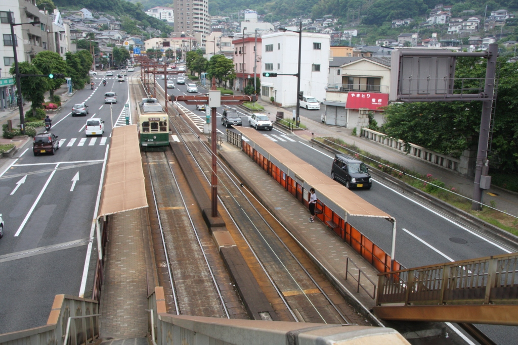 長崎電気軌道 新中川町停留所う